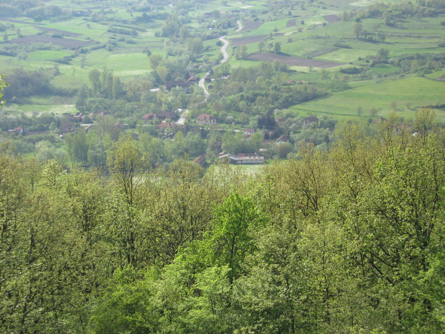 Драган Цветковић, сопствена слика. Доњи Стрижевац, поглед са Шанца.